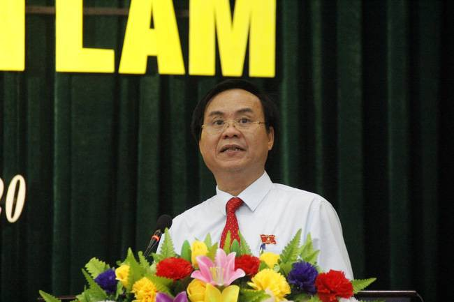 Ông Võ Văn Hưng - Tân chủ tịch UBND tỉnh Quảng Trị